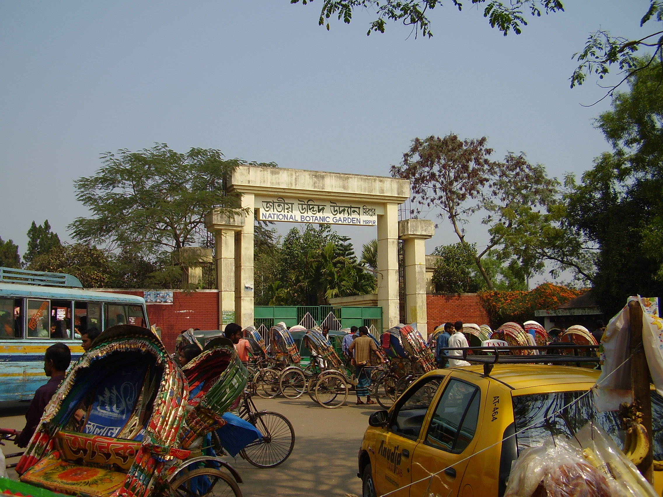 Botanical Garden Dhaka Bangladesh